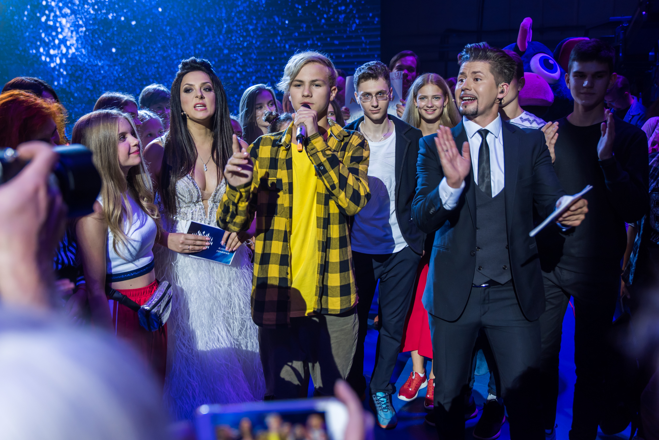 Белорусский отбор на Детское Евровидение 2018. Саша Минёнок